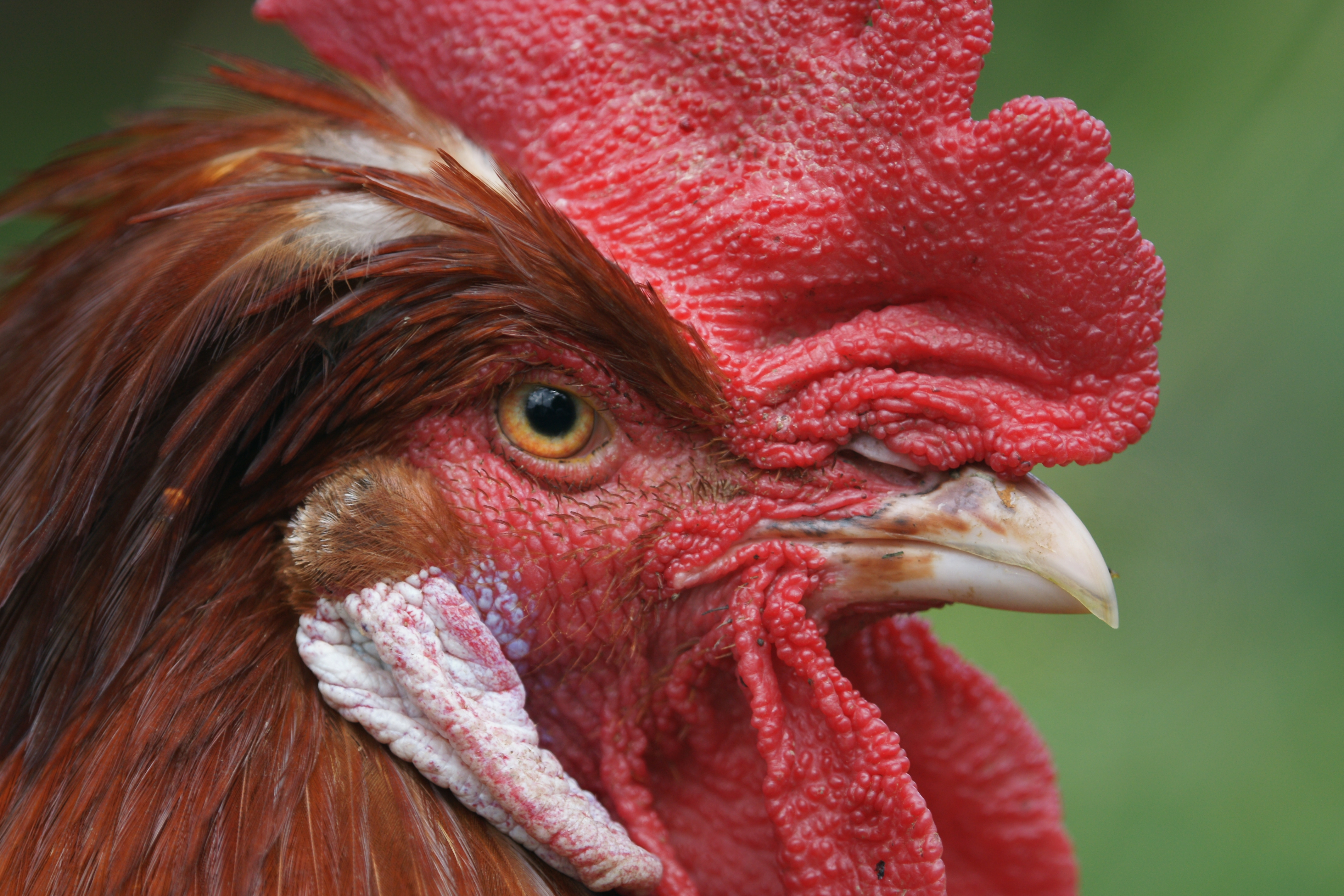 Das Haushuhn (Gallus gallus domesticus) ist eine Zuchtform des Bankivahuhns, eines Wildhuhns aus Südostasien, und gehört zur Familie der Fasanenartigen (Phasianidae). Hier eine Nahaufnahme eines Hahn. Gesehen im Hatlerdorf.